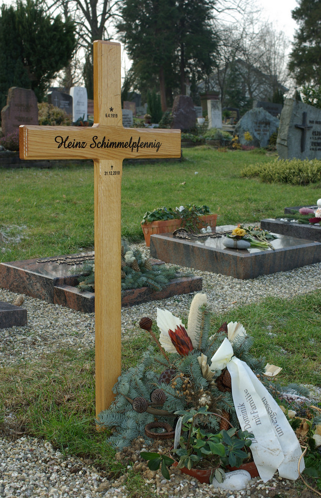 Das Urnengrab des Schauspielers Heinz Schimmelpfennig wenige Wochen nach seiner Beerdigung auf dem evangelischen Friedhof Gernsbach